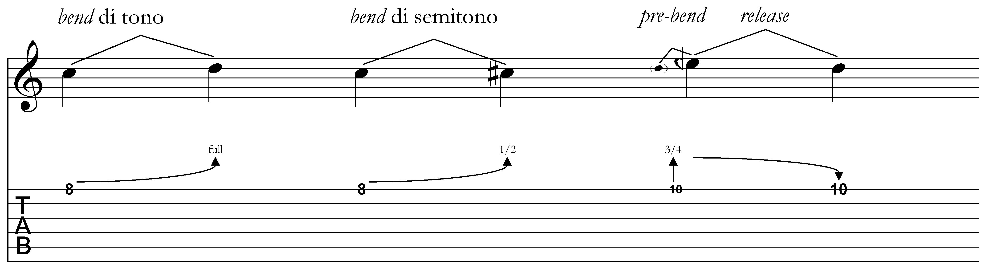 Glissando